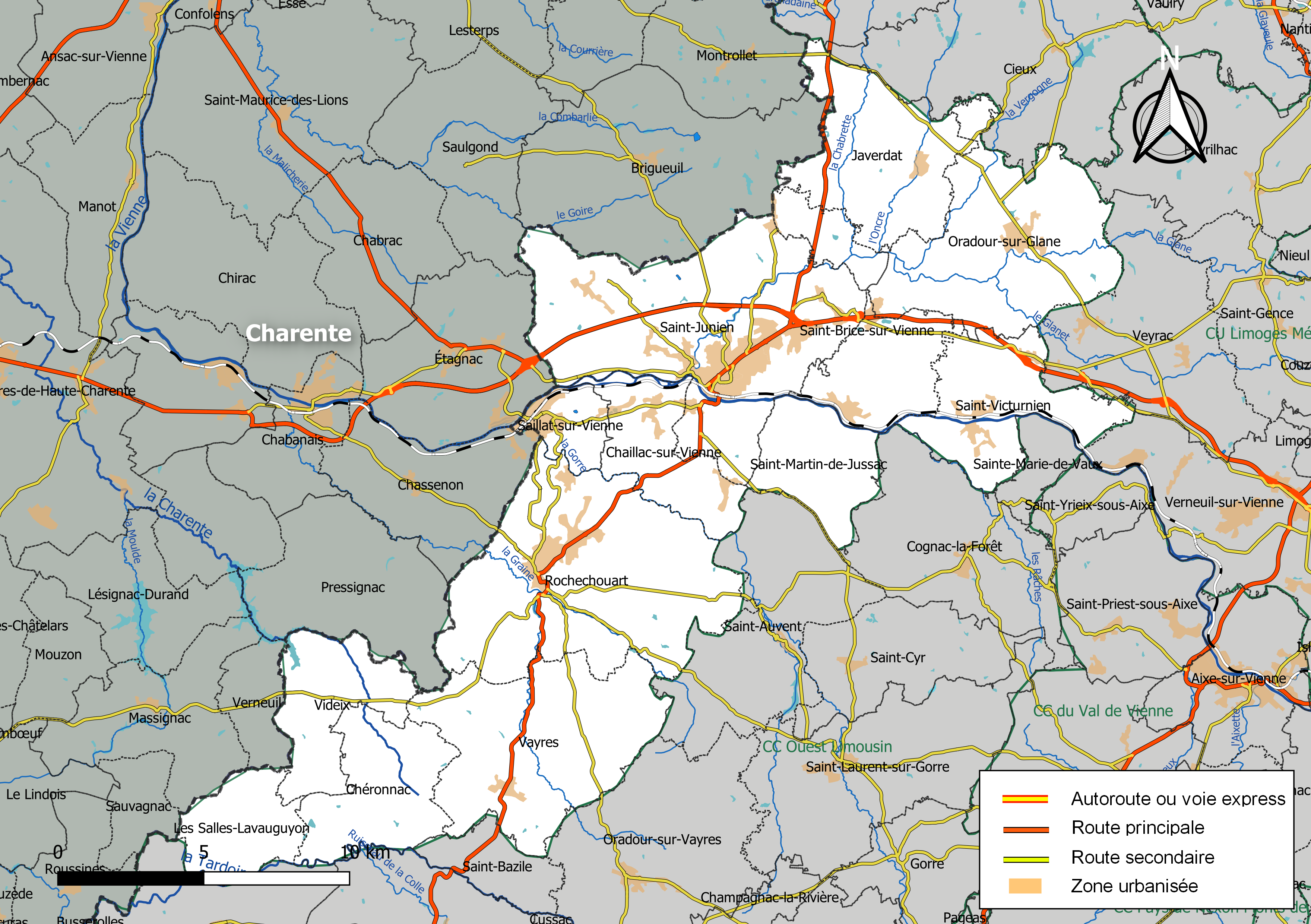 Carte géographique de la Communauté de communes Porte Océane du Limousin, département de la Haute-Vienne, France. Composition au 1er janvier 2019.